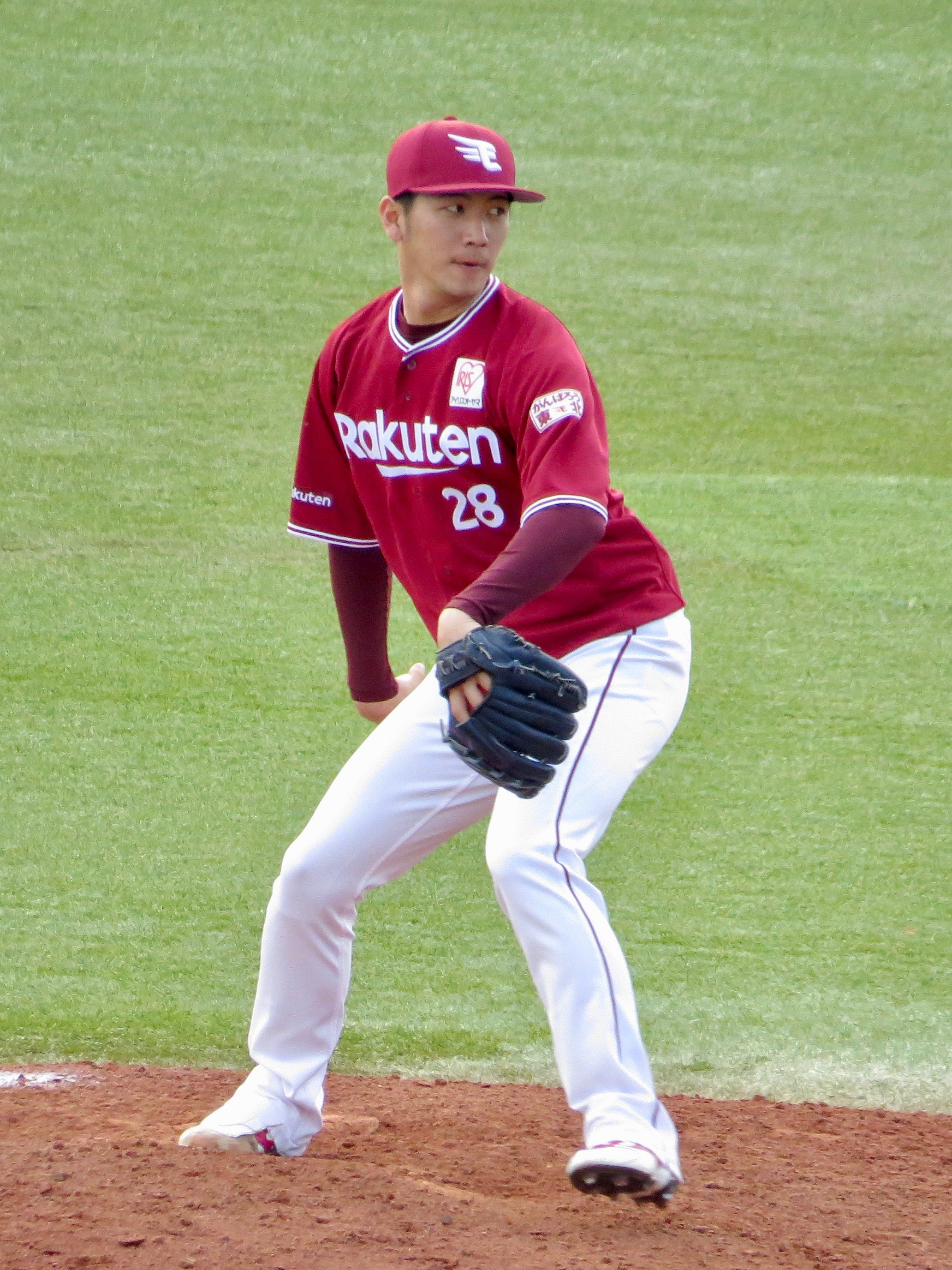 ヤクルト戸田球場にて